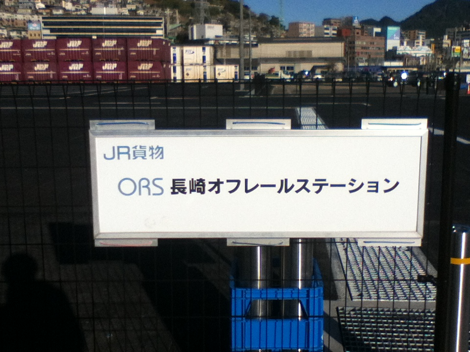 長崎駅貨物